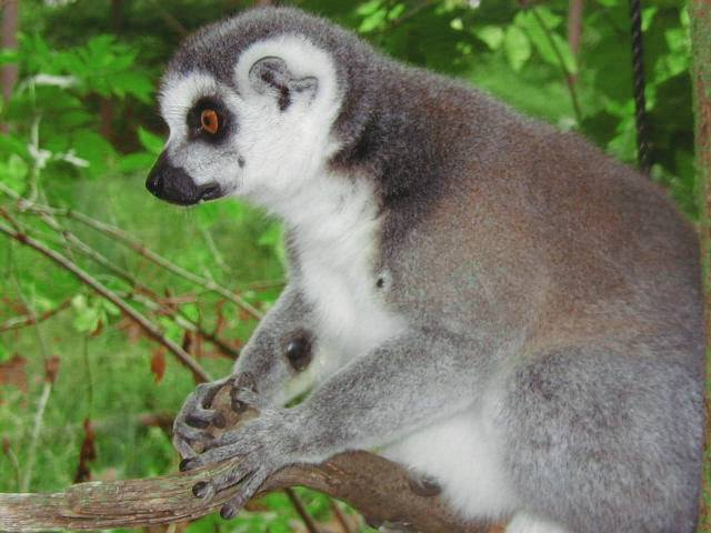 Decription : photo en gros plan d'un lémurien, au parc zoologique Apenheul à Apeldoorn aux Pays-Bas. Espèce à préciser.